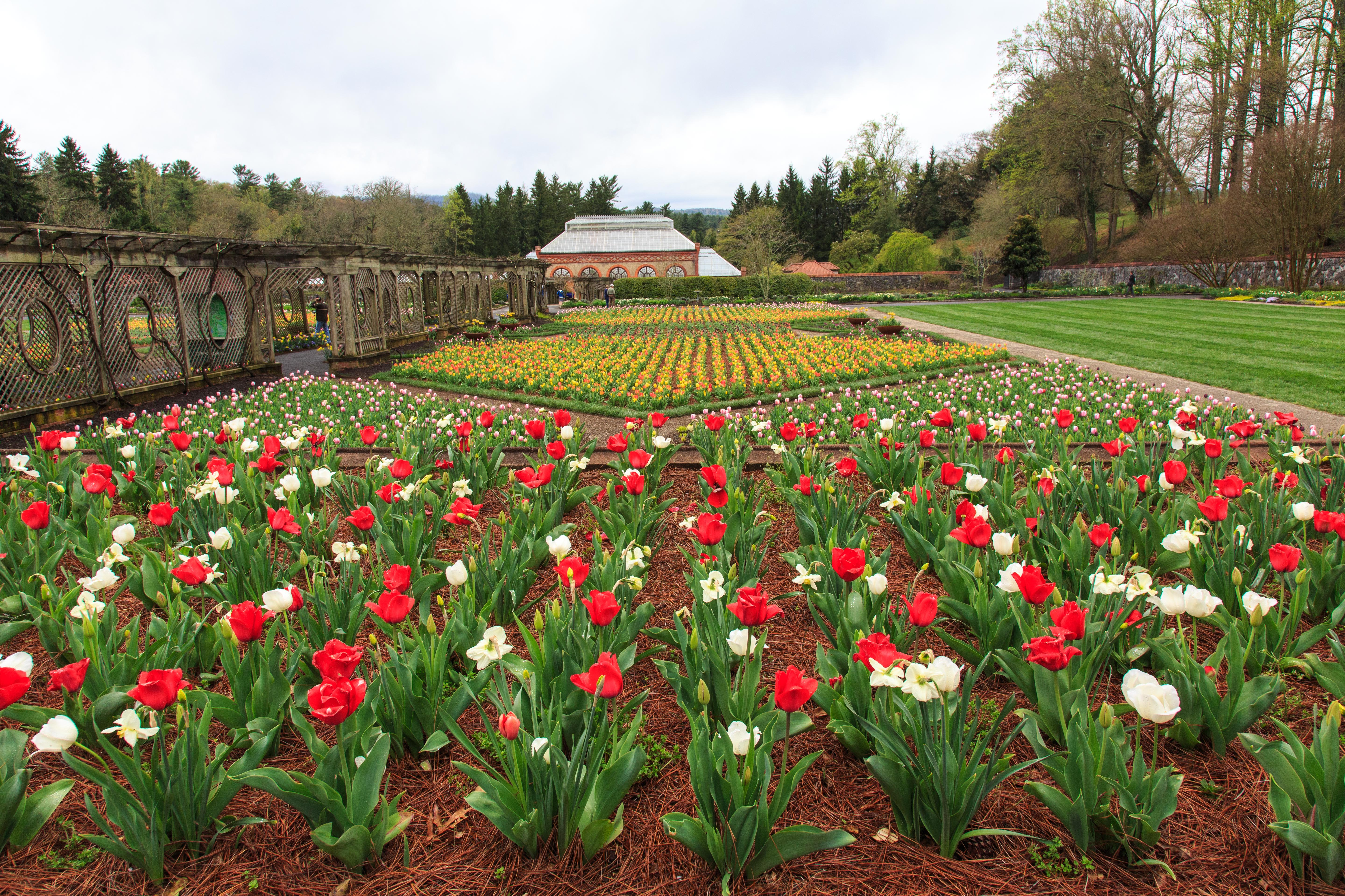 Biltmore Estates - Tulip Garden